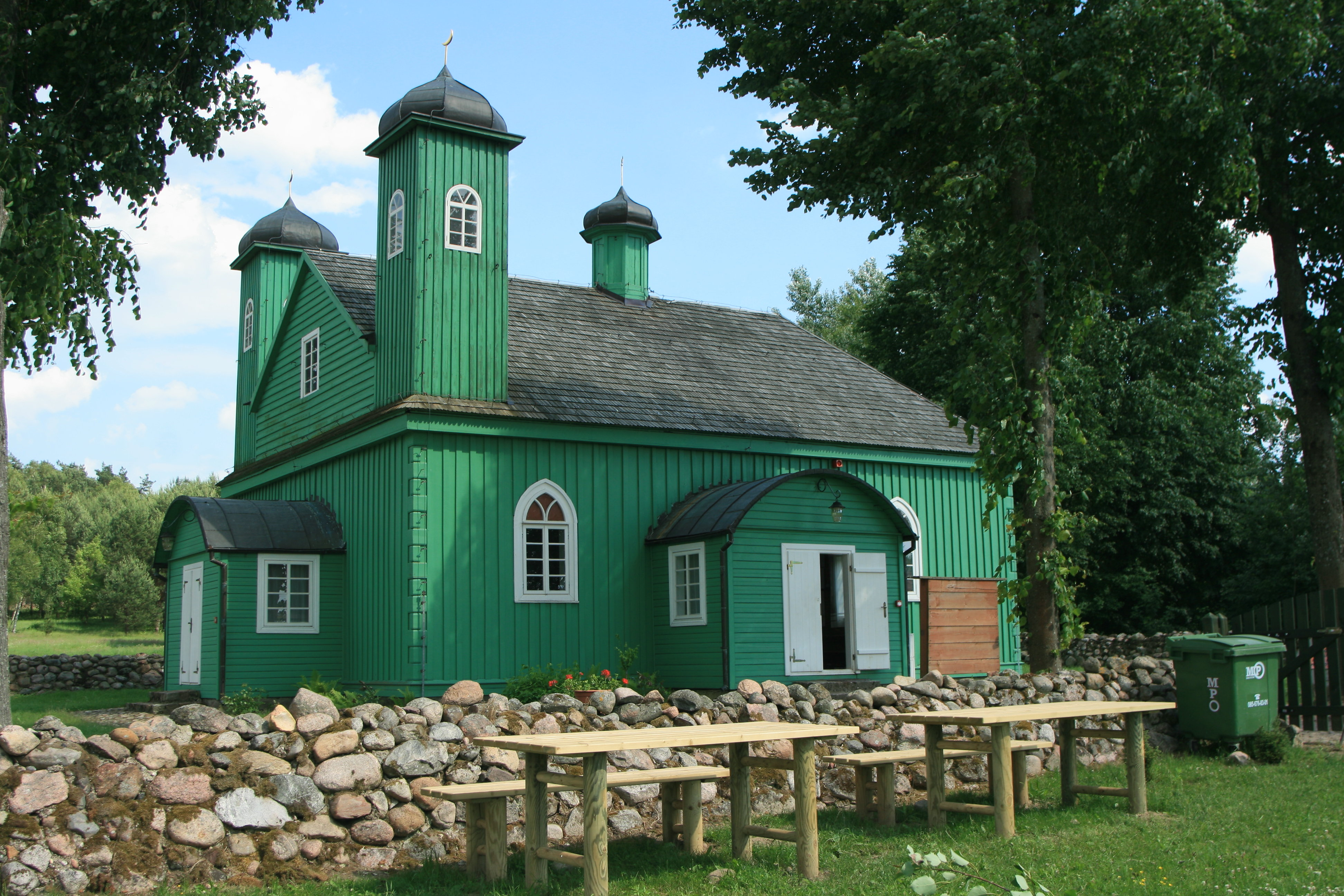 Gmina Krynki, Poland